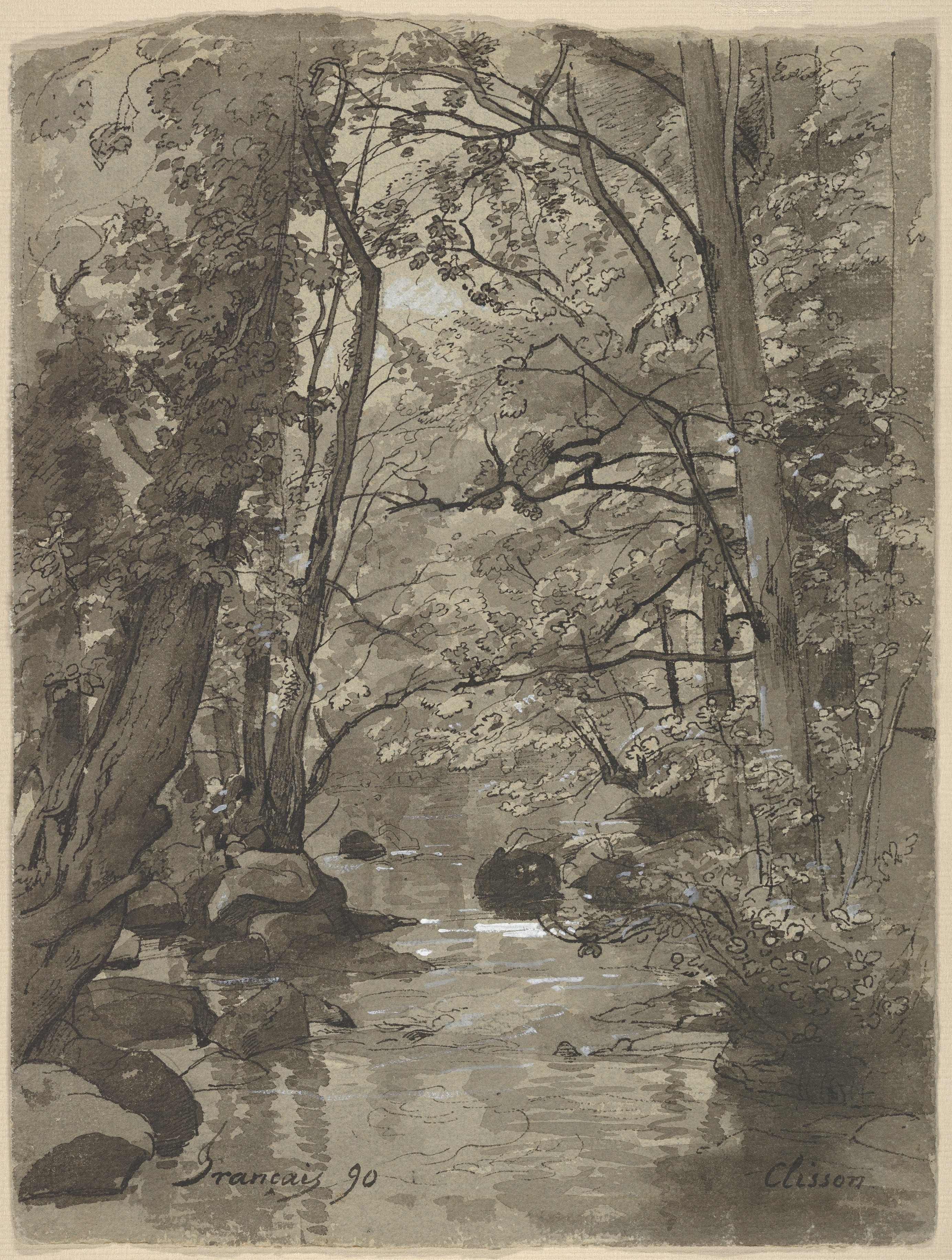 Drawing; Drawings